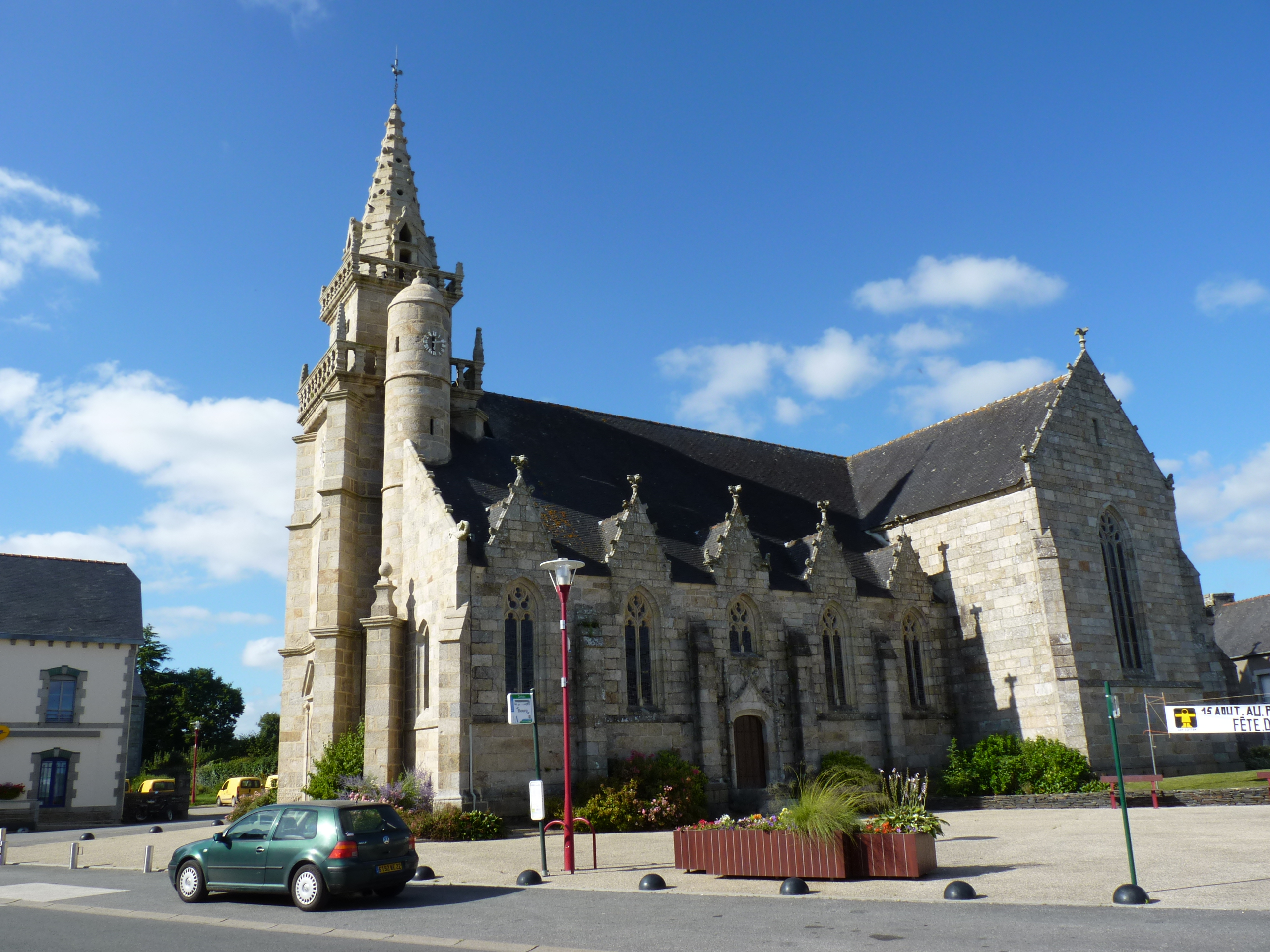 Église Saint-Pierre de Maël-Carhaix (16ème et 17ème siècles)